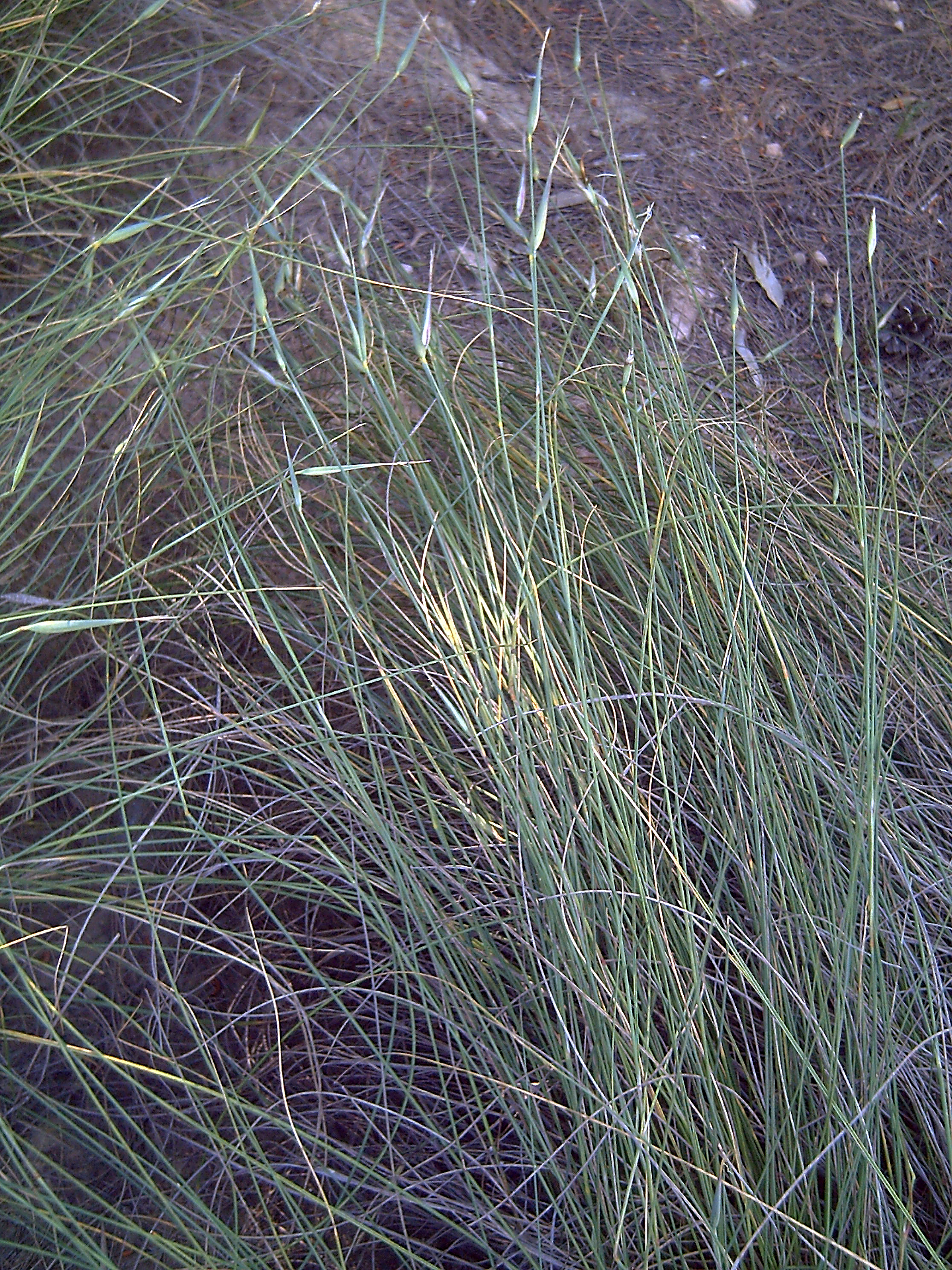 Lygeum_spartum en La Mata, Torrevieja, Alicante, Spain